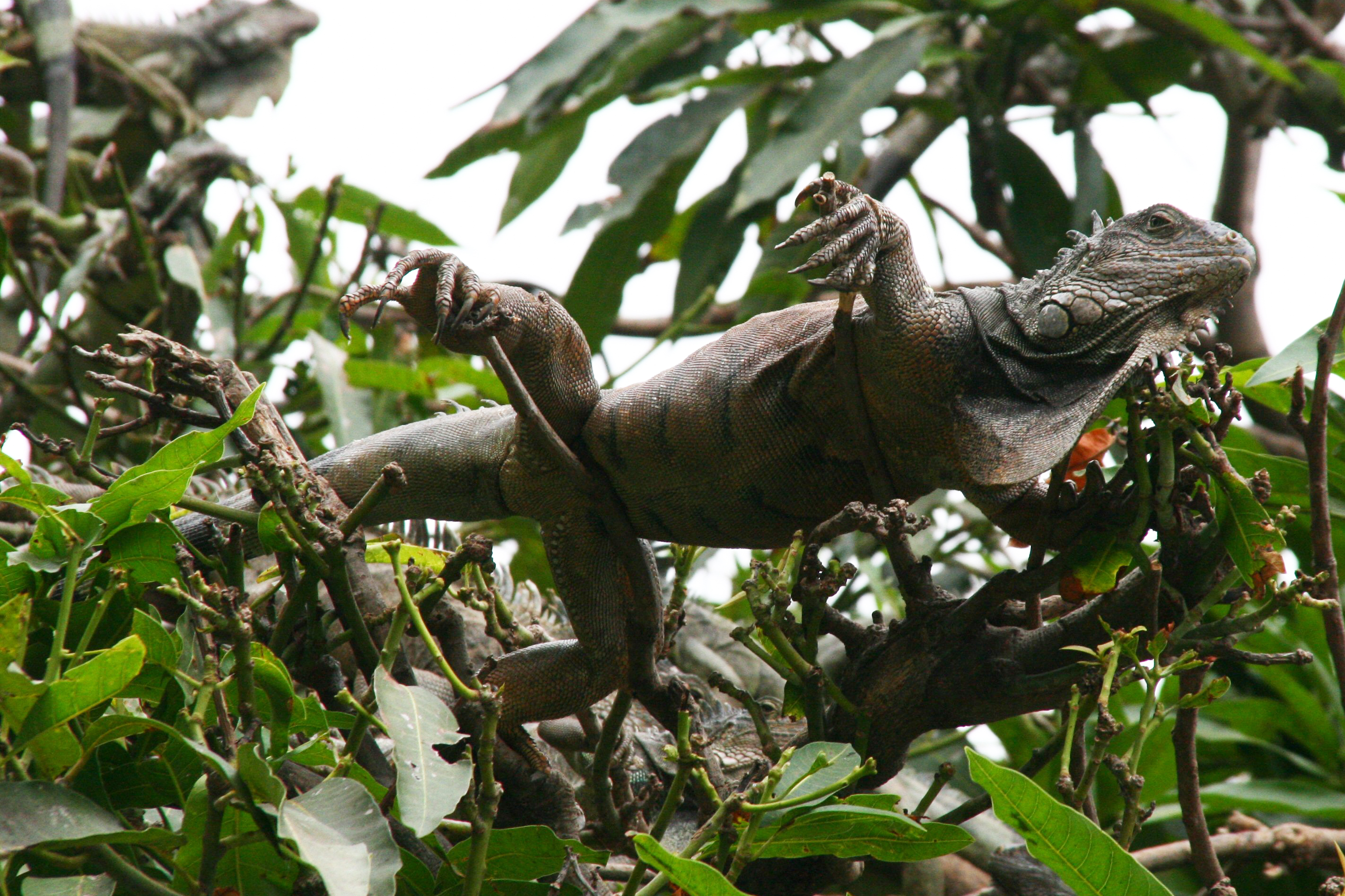 Schwarzleguan in einem Ficus